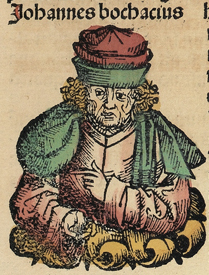 Portrait of Giovanni Boccaccio